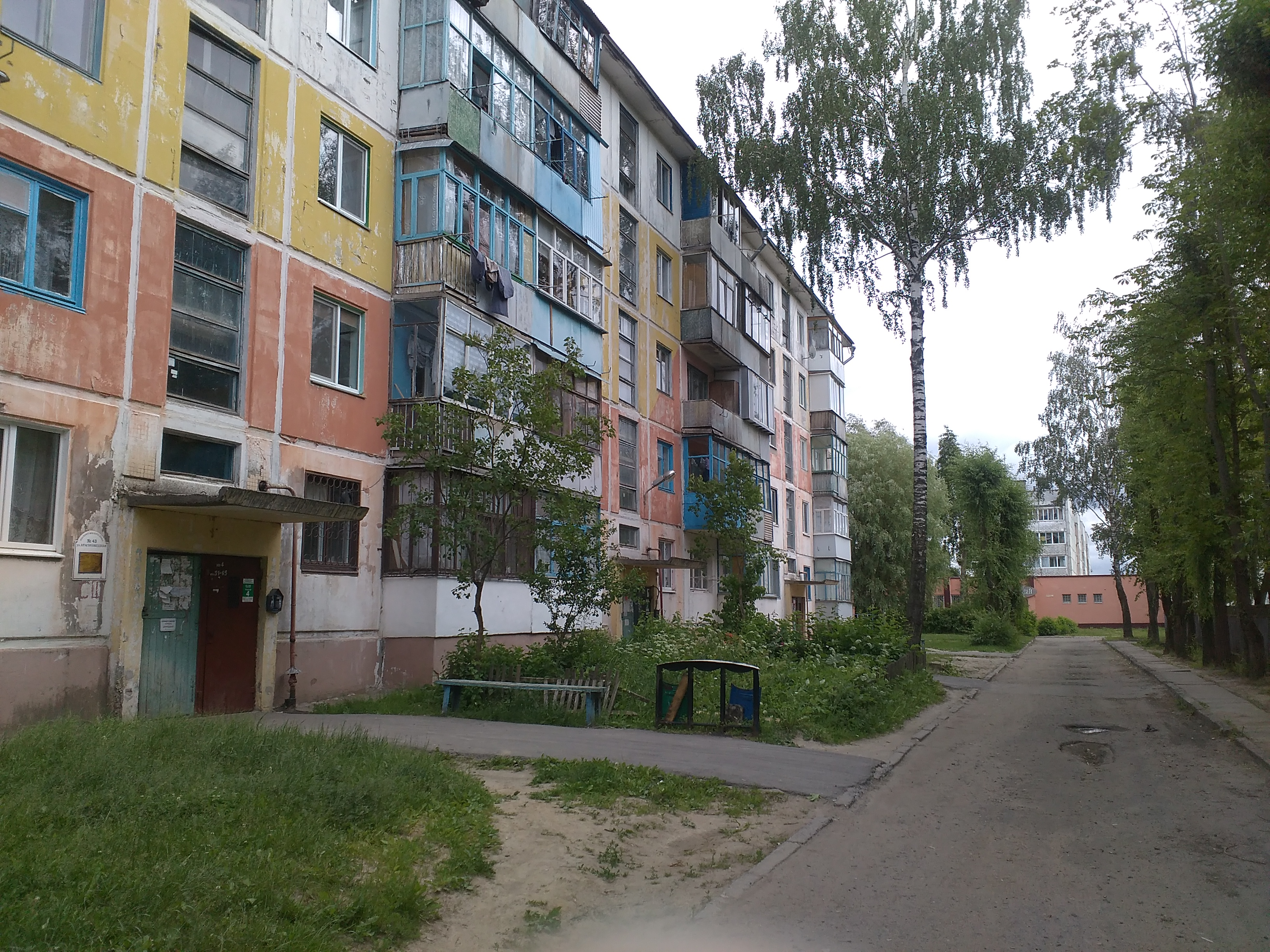 Могилёв, район Казимировка, улица Краснозвёздная, дом 43. Напротив Детского сада №94